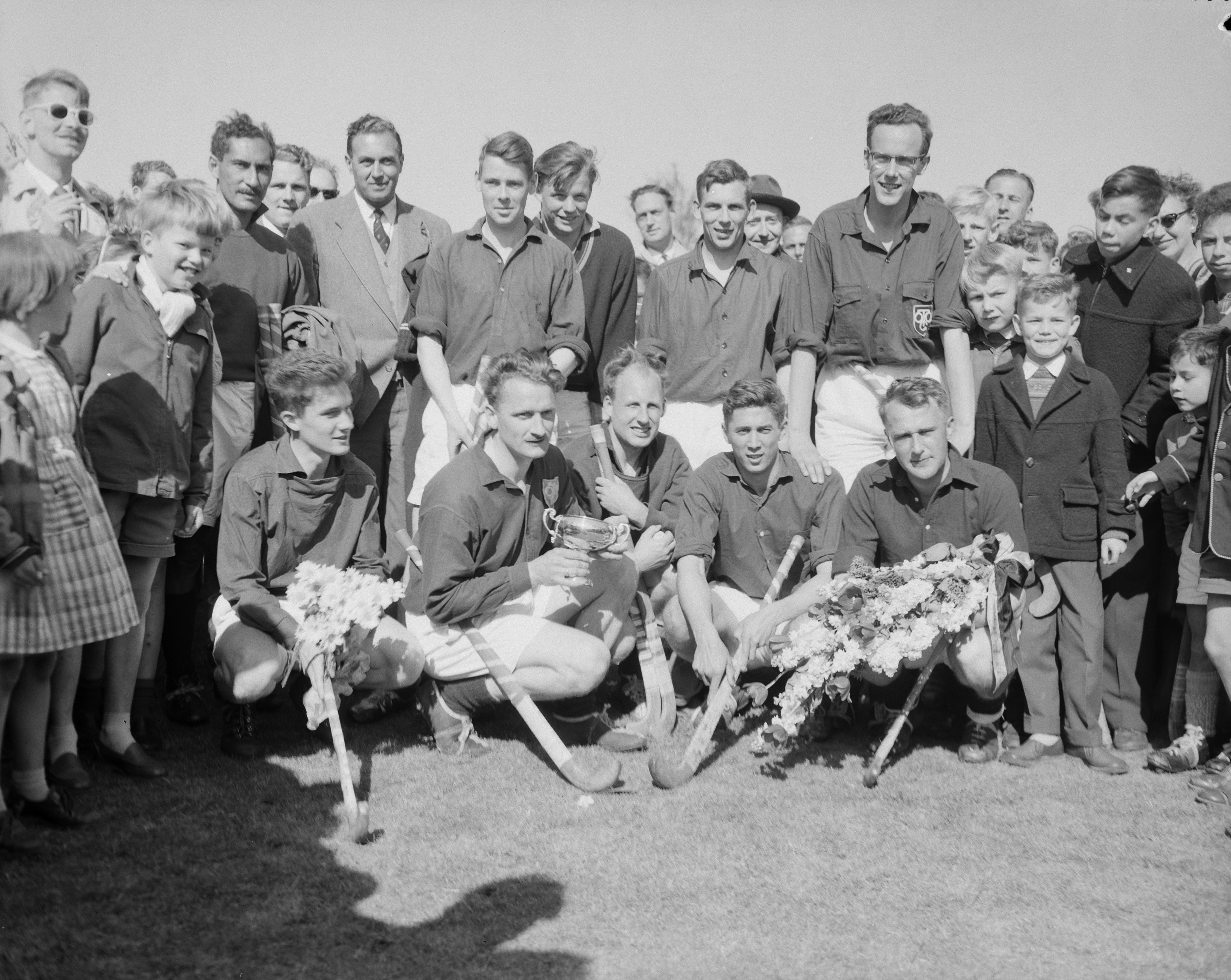 Collectie / Archief : Fotocollectie Anefo Reportage / Serie : [ onbekend ] Beschrijving : Hockey. TOGO tegen HTCC 4-0. TAGO kampioen / aangetast Datum : 26 mei 1957 Locatie : Togo Trefwoorden : hockey, kampioen Fotograaf : Behrens, Herbert / Anefo Auteursrechthebbende : Nationaal Archief Materiaalsoort : Negatief (zwart/wit) Nummer archiefinventaris : bekijk toegang 2.24.01.04 Bestanddeelnummer : 908-6260